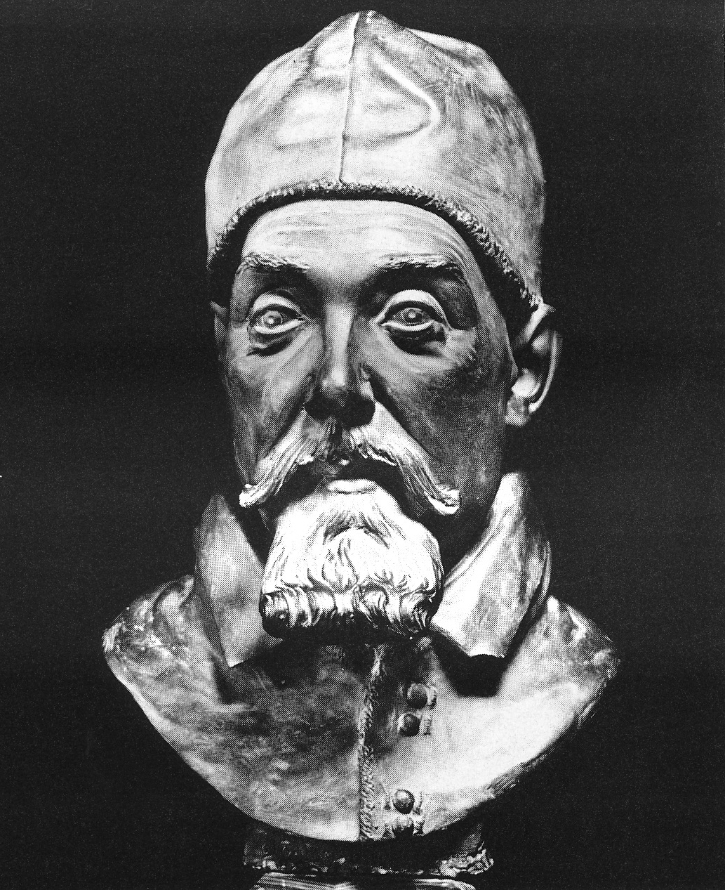 Giovanni Gonnelli, Busto di Urbano VIII, Pinacoteca di Palazzo Barberini, Roma, firmato "GIO. GAMBASSI CIECO FECE"